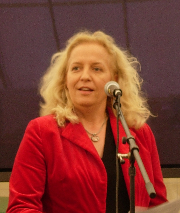 Maarit Tastula Maailma kylässä -festivaaleilla.